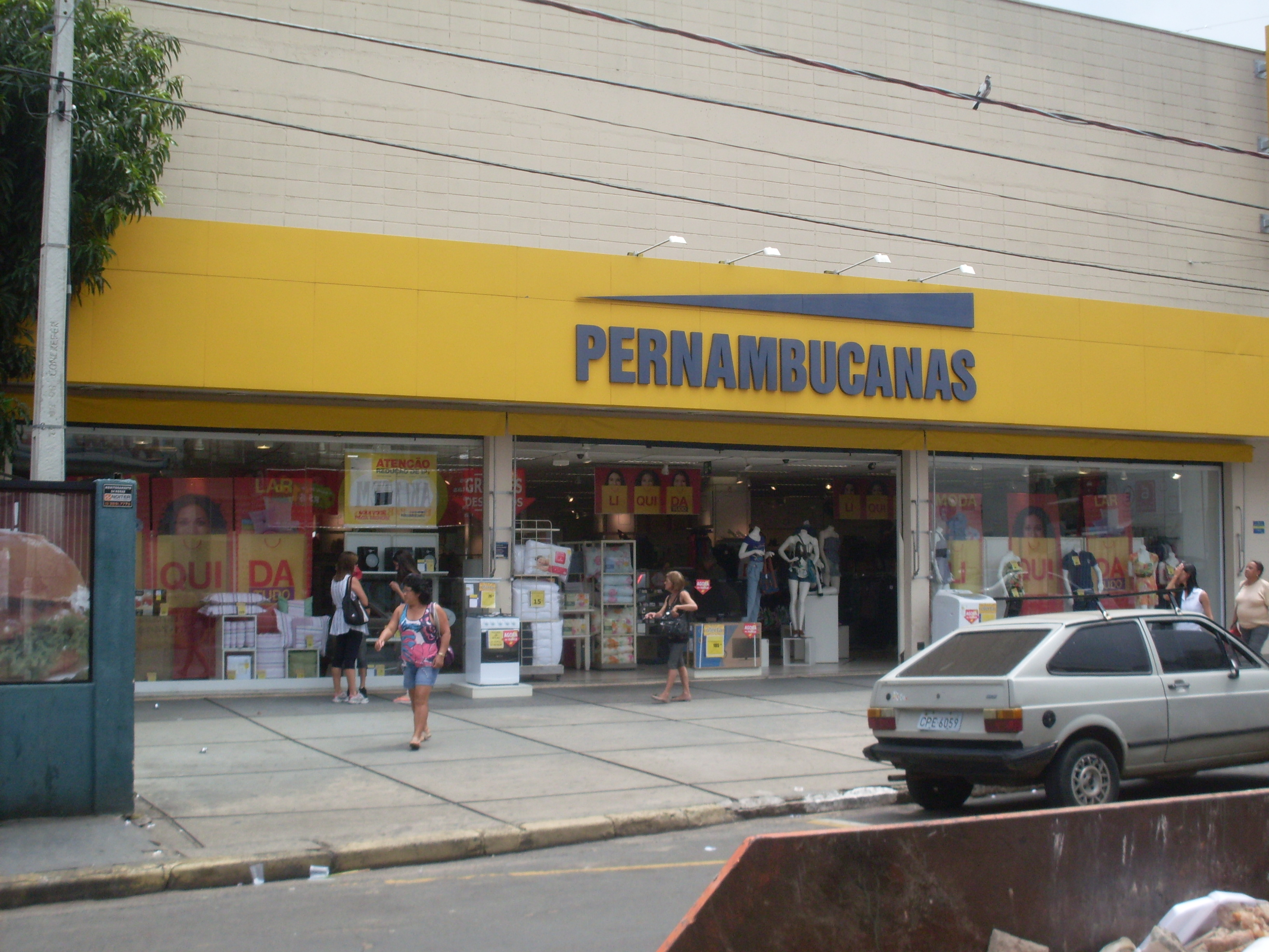 Pernambucanas de Mogi Guaçu Centro